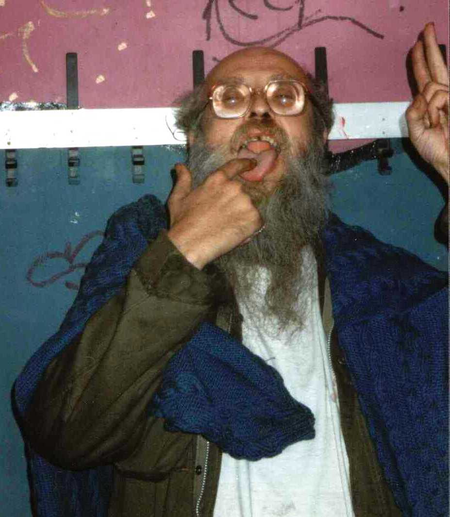 Wolf «Blues Wolf» Schmidt (1949-2009) im Rahmen eines Konzertbesuchs im selbstverwalteten Jugendzentrum (SJZ) Siegburg (Heinrichstraße 4, 53721 Siegburg)